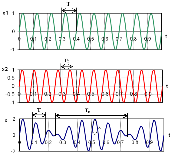 Честотно биене получено след наслагване на два сигнала с разлика 20 % в честотите им.